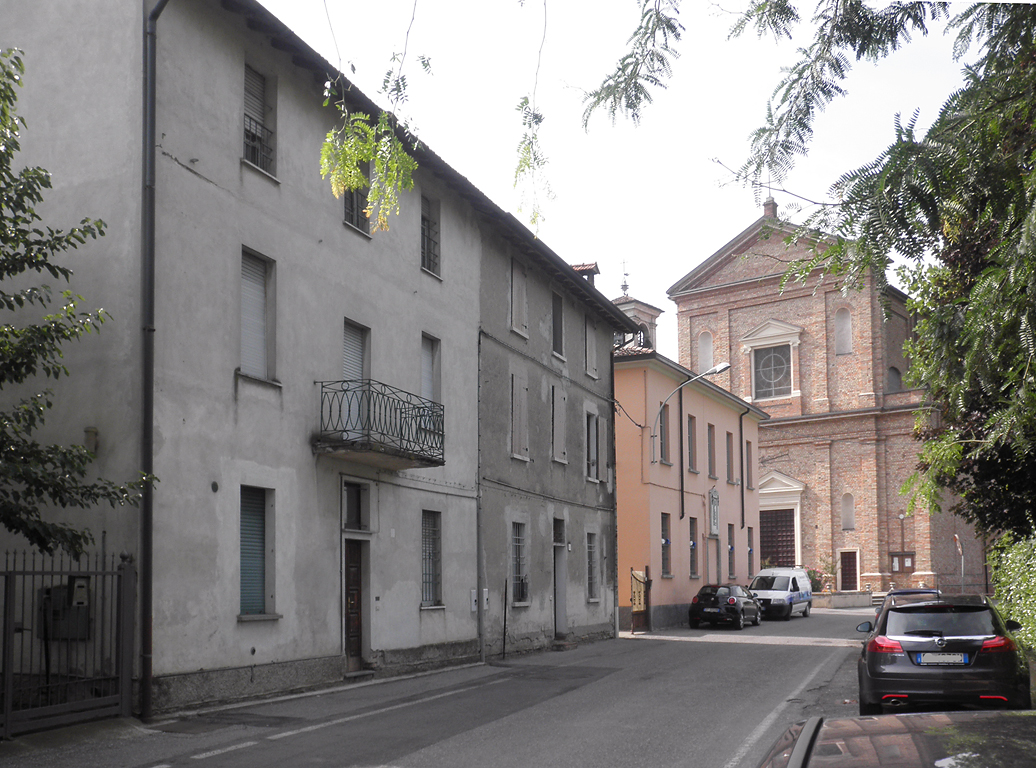 Vista di Santo Stefano in Vairano, frazione del comune di Crema.